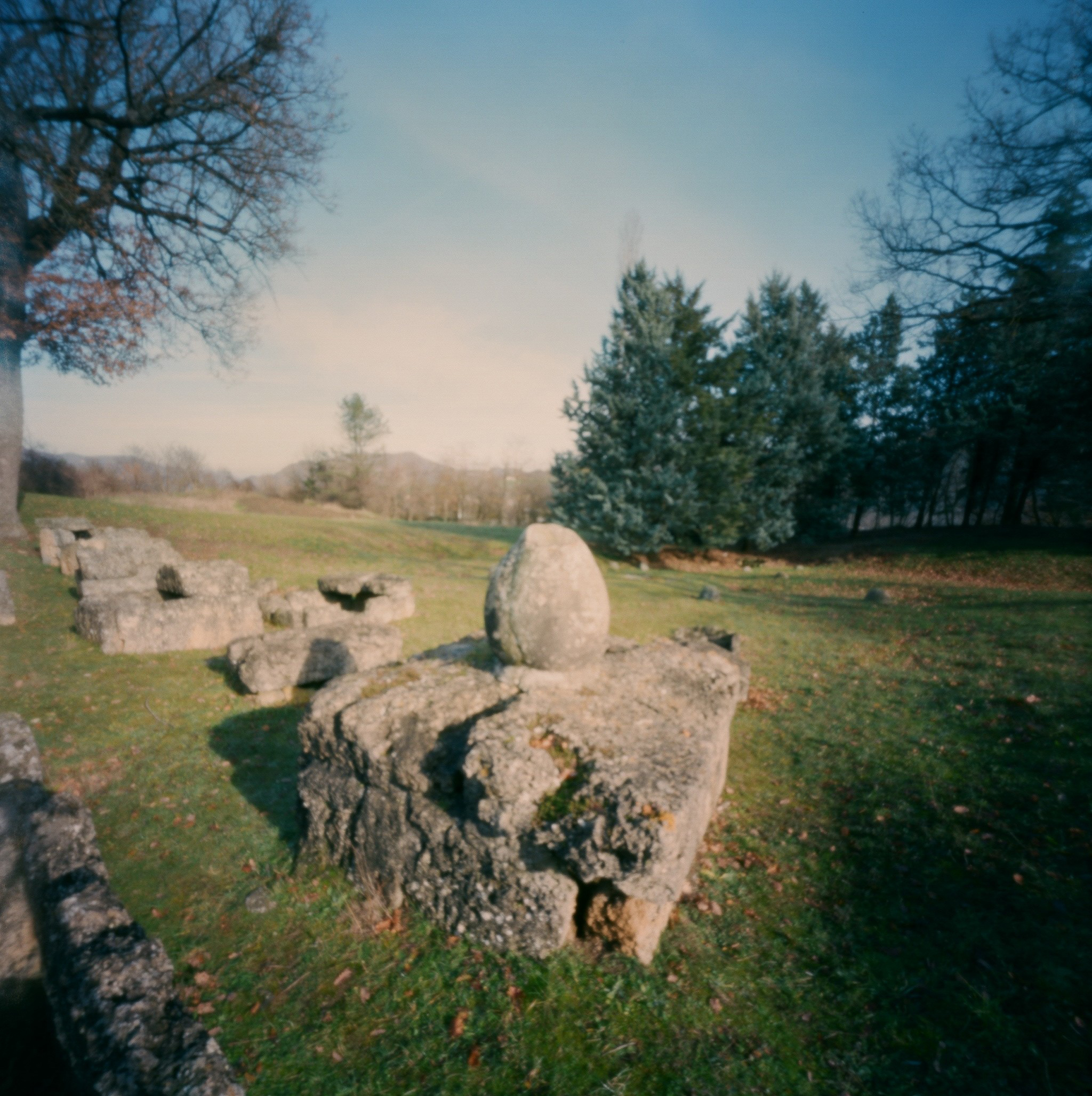 Area archeologica di Marzabotto/Kainua - MIBAC This is a photo of a monument which is part of cultural heritage of Italy.